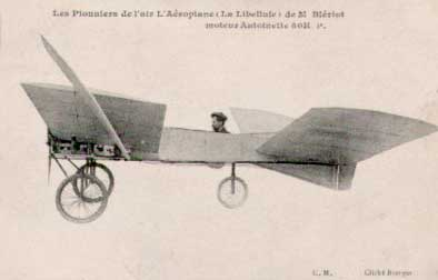 Bleriot VI in contemporary postcard, circa 1907.